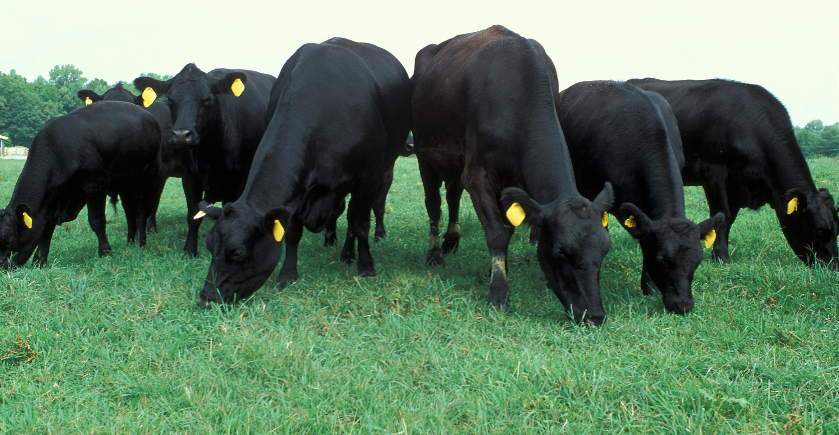 Angus cattle grazing